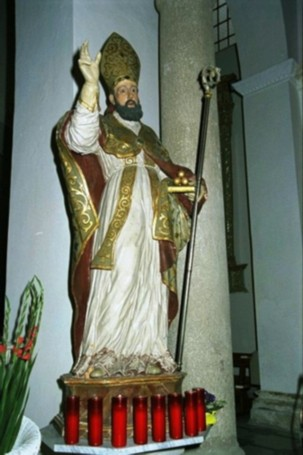 Statua lignea (XVI secolo) di San Nicolò (San Nicola di Bari) a Venetico Superiore